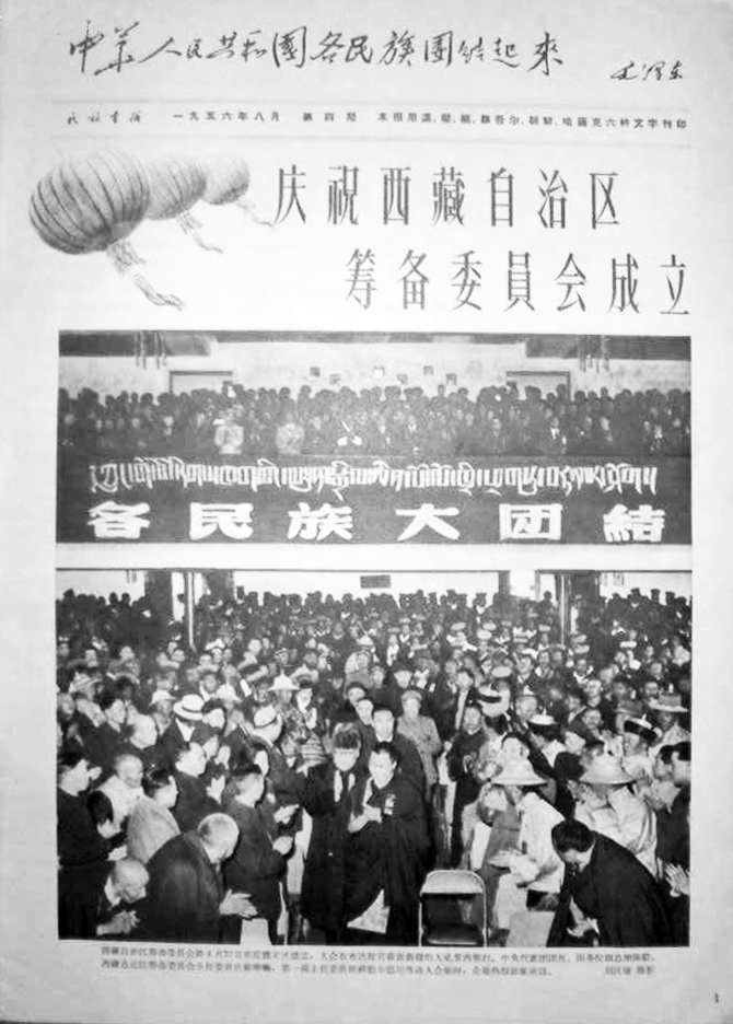 1956年《民族画报》第四期（庆祝西藏自治区筹备委员会成立专号）上刊登的西藏自治区筹备委员会成立大会照片，陈毅、达赖、班禅步入会场，受到热烈欢迎。